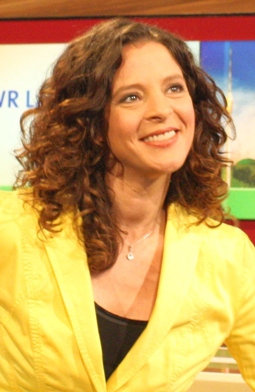 Financial T(’a)ime, Schülerzeitung der Kaufmännischen Schule Tauberbischofsheim. Am 2. April 2014 wurde ein TV-Beitrag der Landesschau Baden-Württemberg zum Besuch der Schülerzeitungsredaktion der Financial T('a)ime in der Medienwerkstatt 2014 des SWR Fernsehens ausgestrahlt.